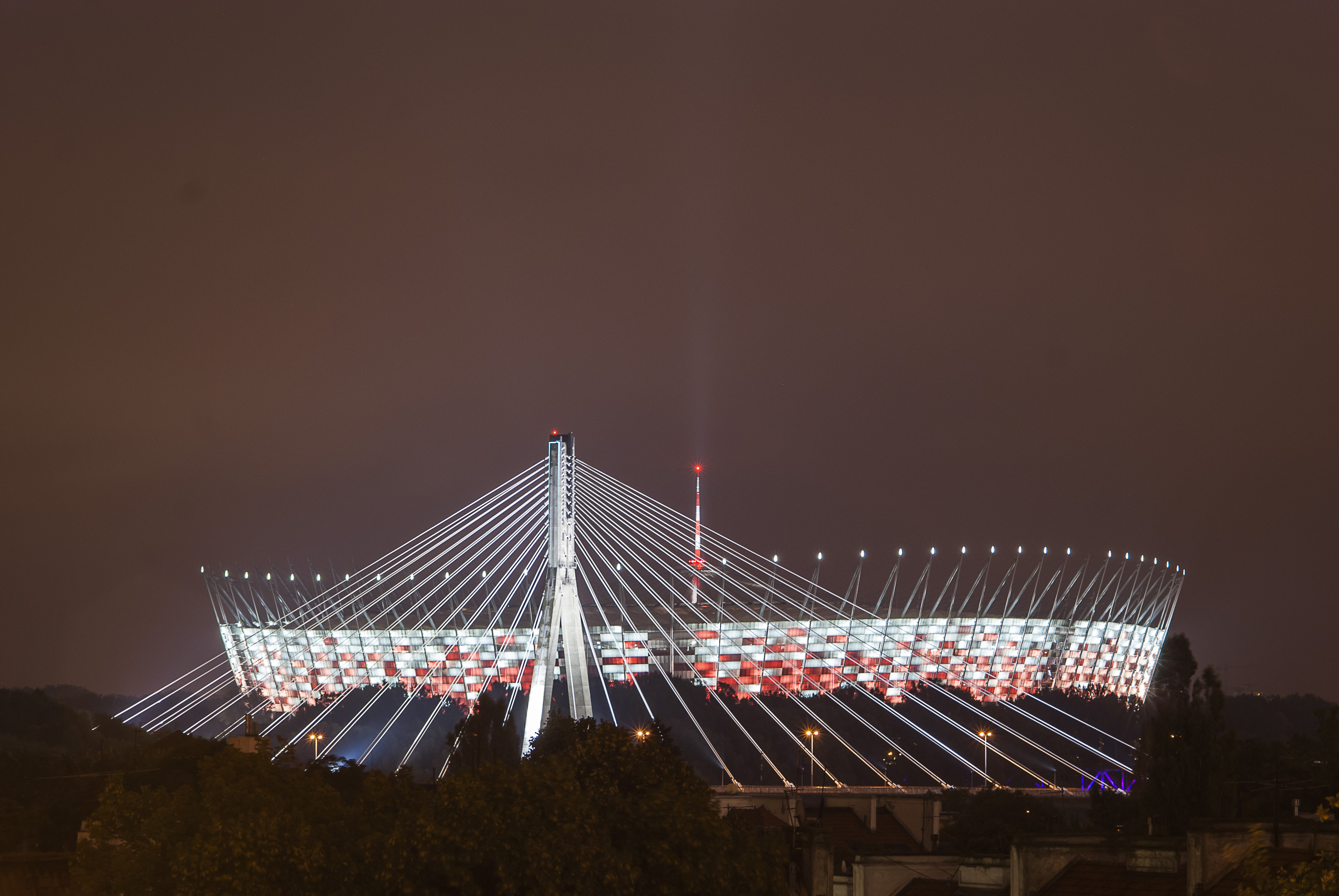 Stadion Narodowy w Warszawie